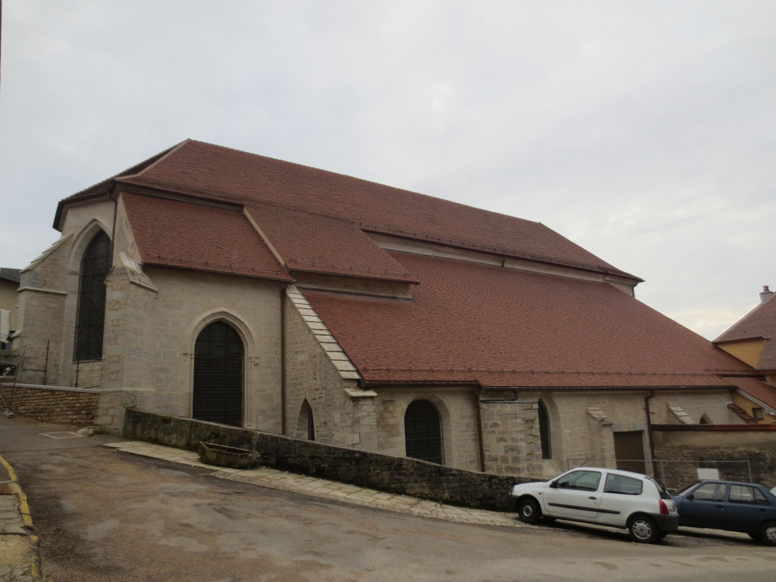 Couvent des Jacobins de Poligny : vue arrière de l'église